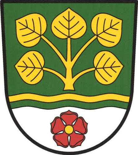 Znak obce Nebahovy